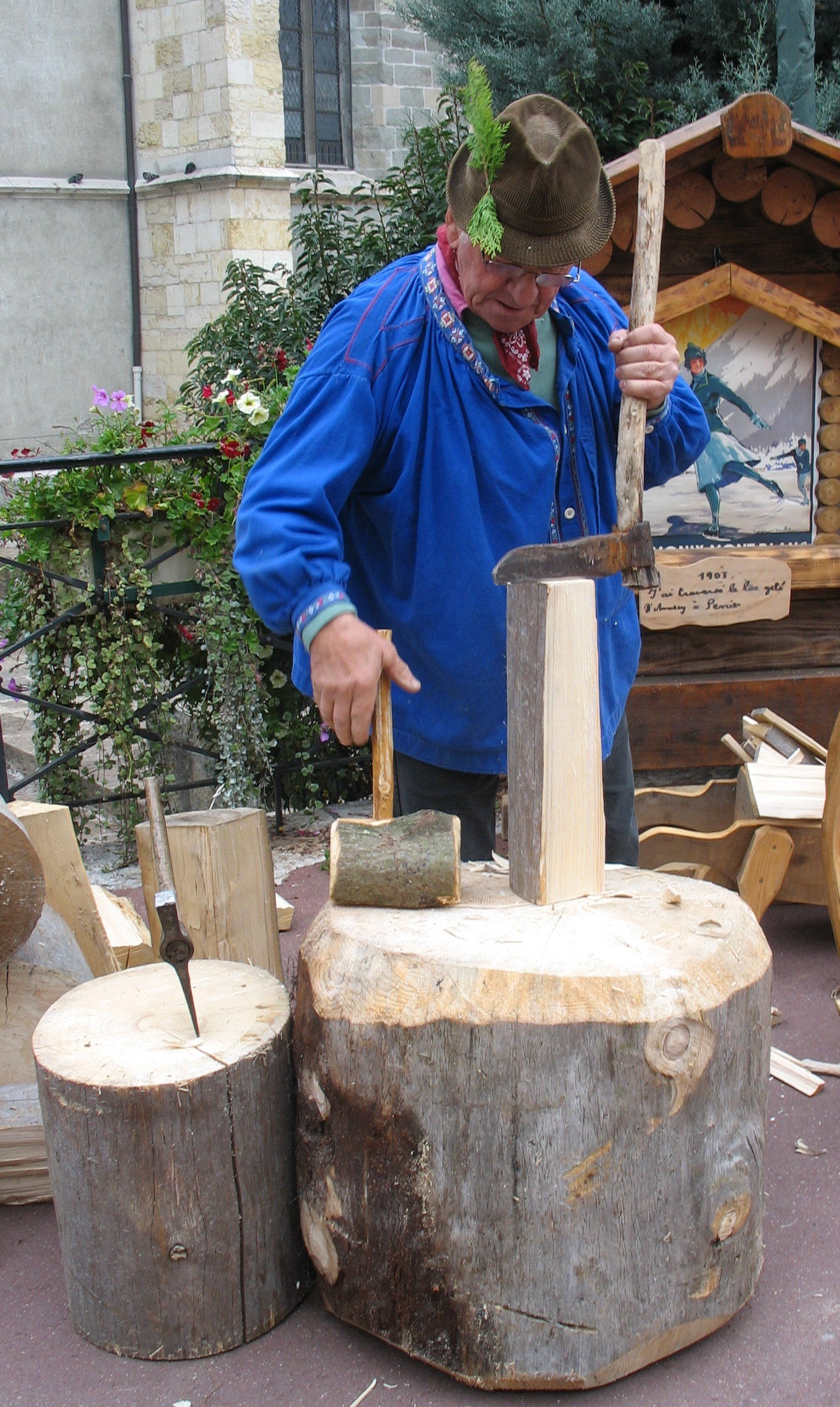 Fabrications des tavaillons.